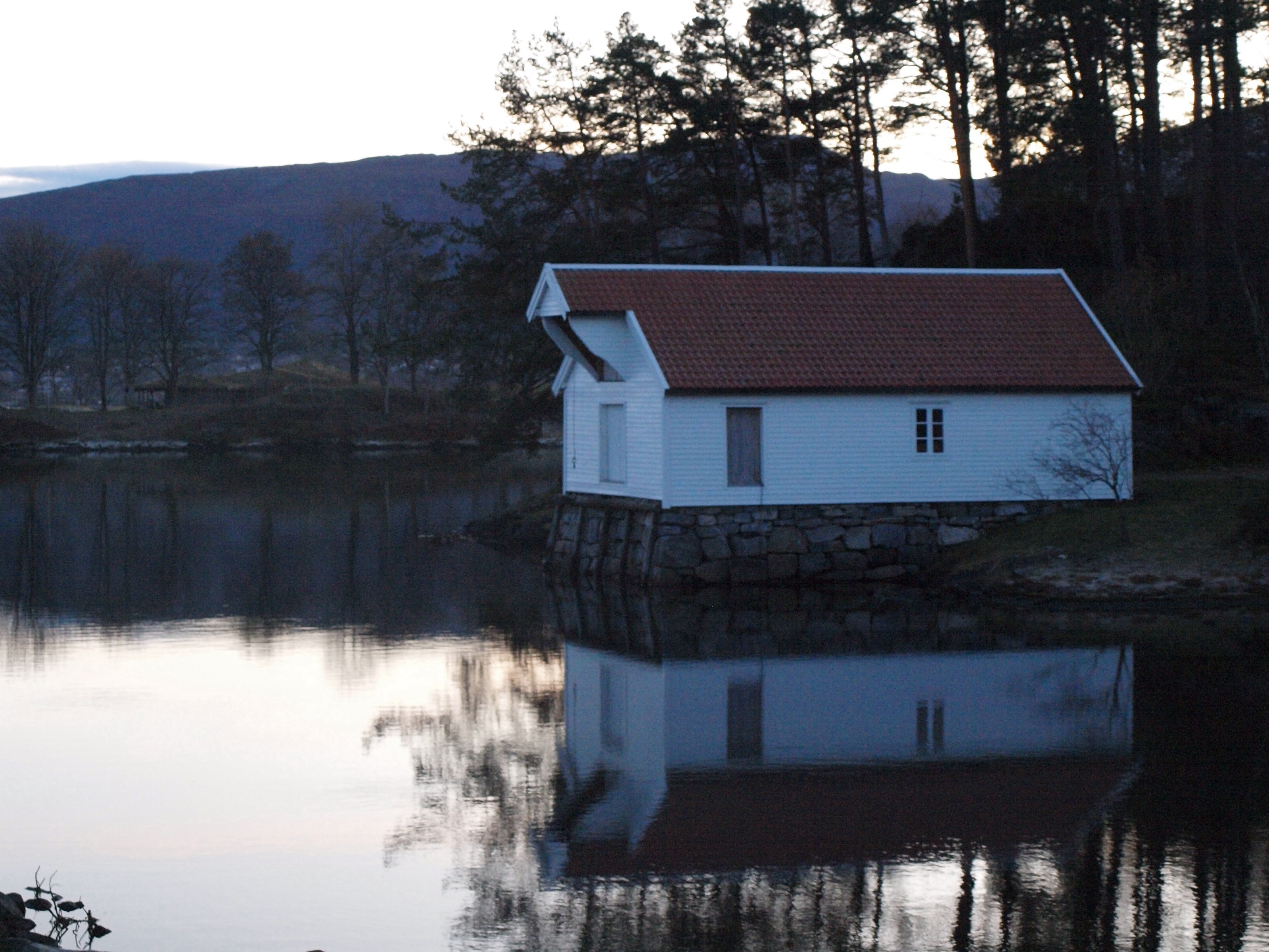 Larsnesbuda, Sunnmøre Museum